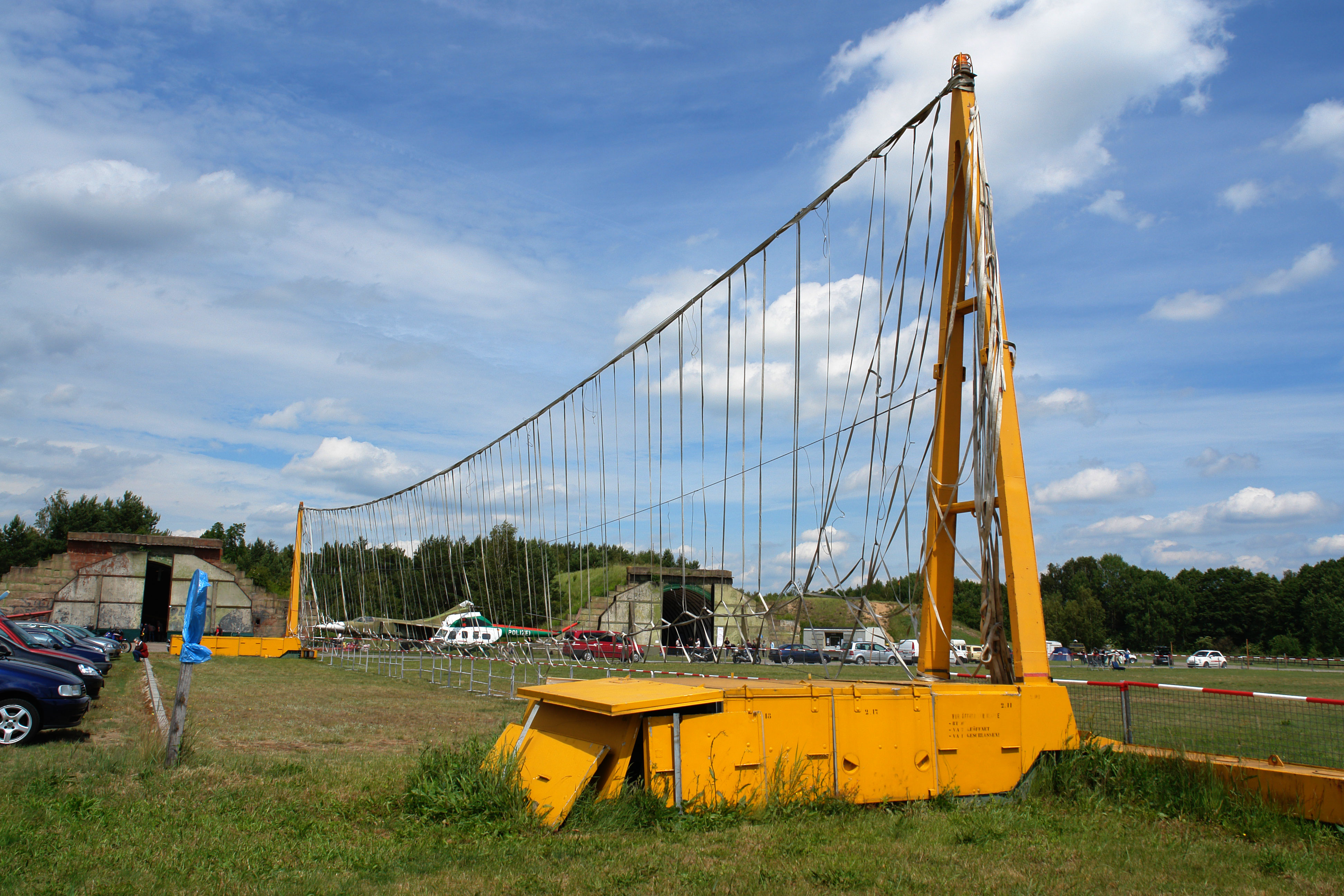 Flugzeugfangnetz aus DDR-Produktion